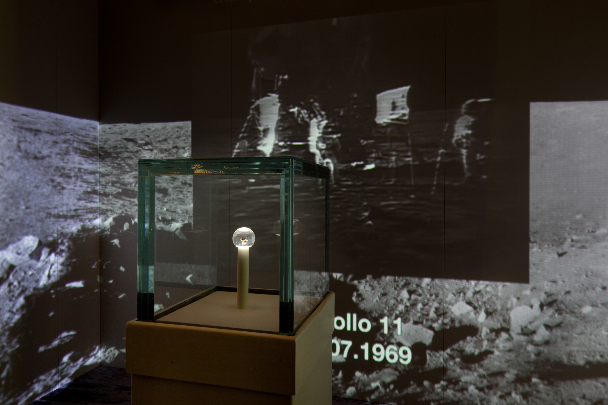 Pietra lunare esposta nell'allestimento dedicato allo spazio, al Museo nazionale della scienza e della tecnologia Leonardo da Vinci, Milano. Il campione di roccia fu raccolto sul suolo lunare dagli astronauti dell'Apollo 17, l'ultima missione umana sulla Luna che si svolse fra il 7 e il 19 dicembre 1972.[1]